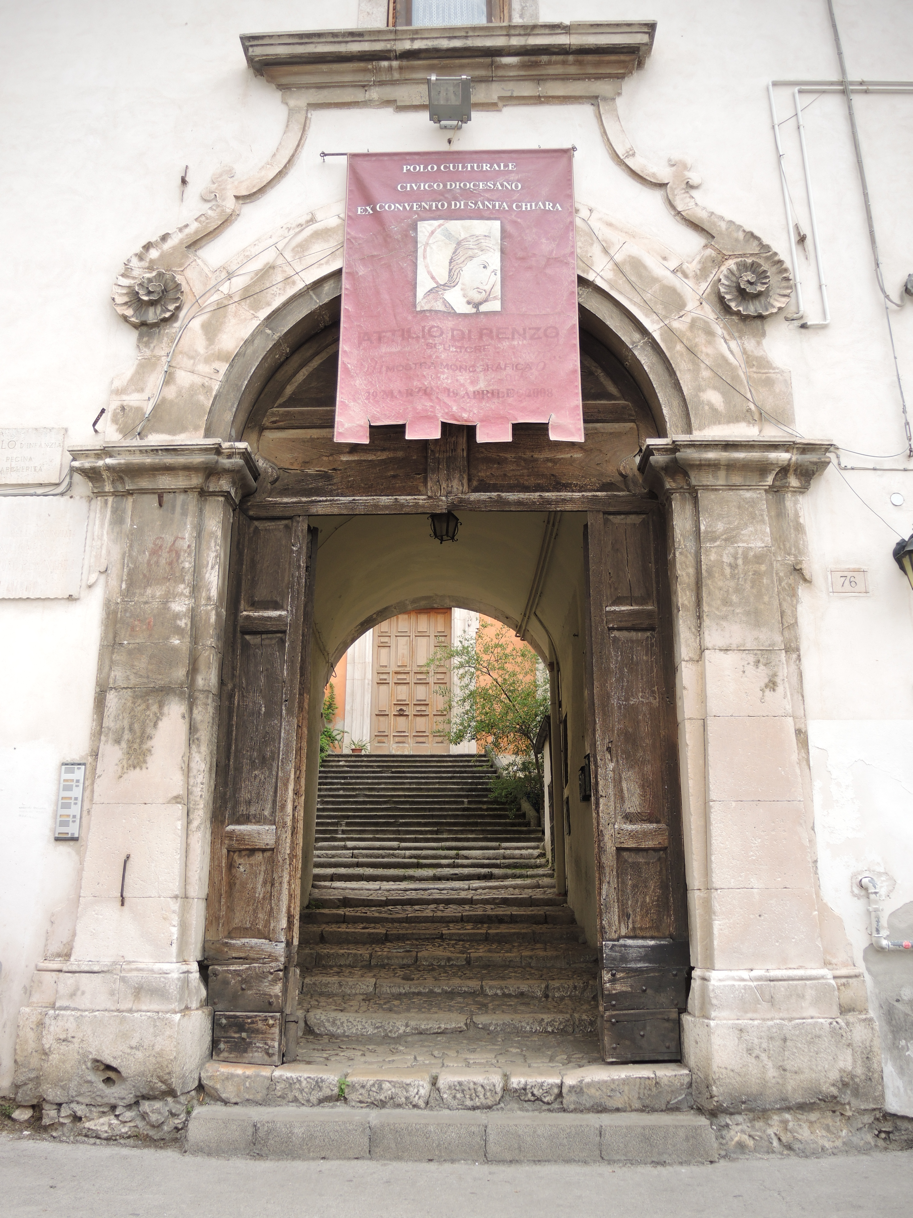 Sulmona: Monastero di Santa Chiara